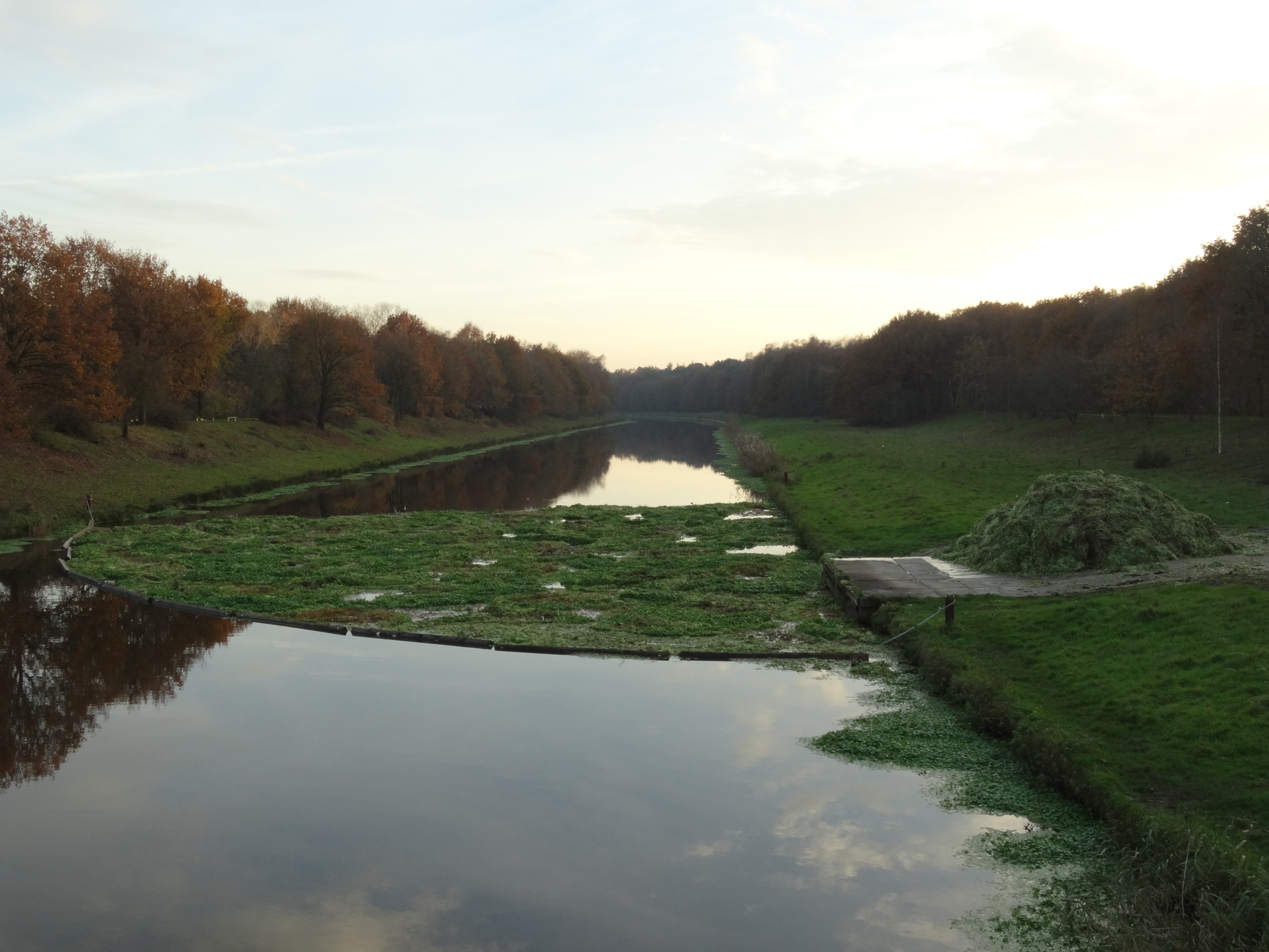 Verzamelen en verwijderen van de Grote waternavel in het Drongelens Kanaal ter hoogte van de Drunenseweg.